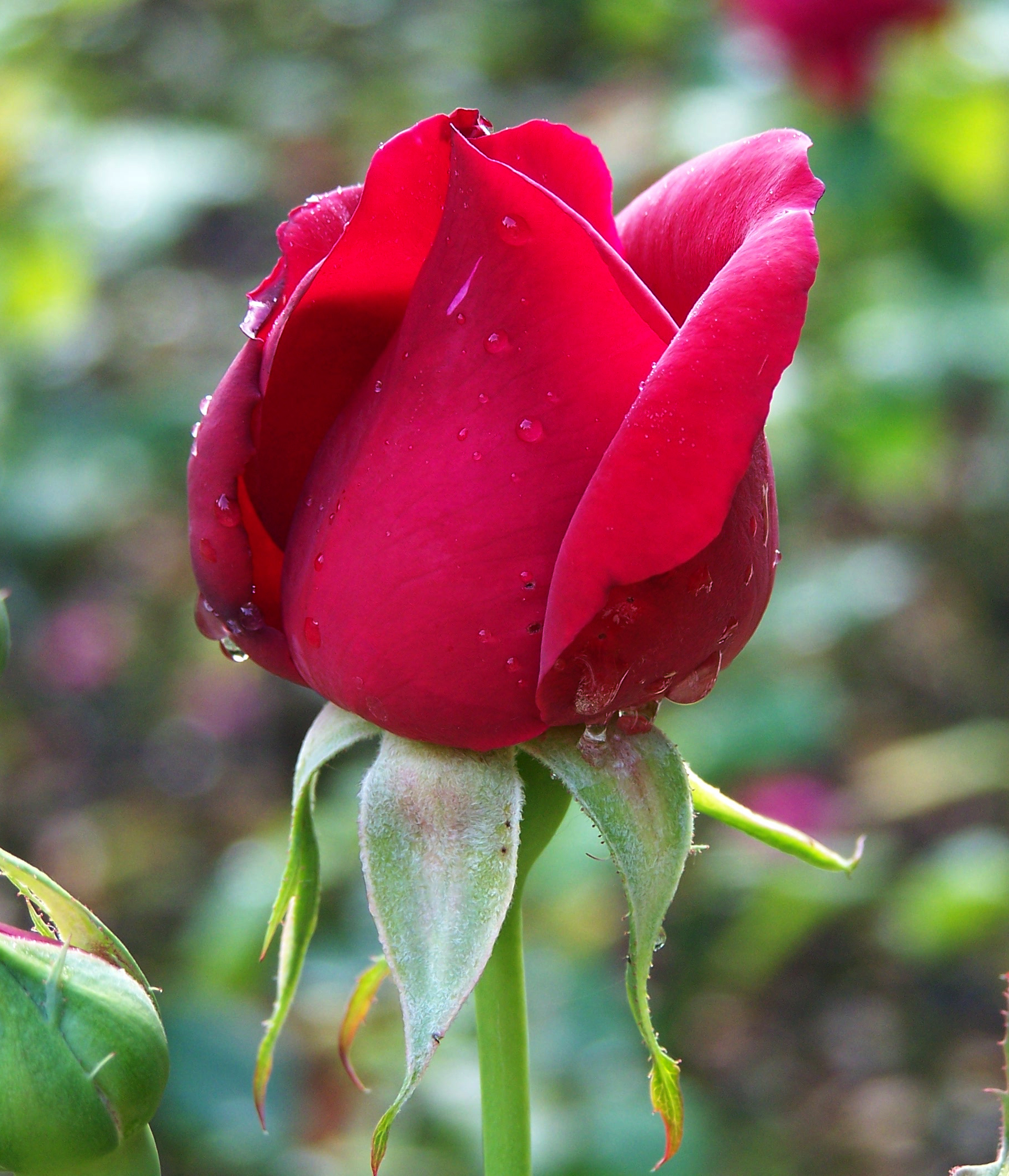 Name Rosa sp. Family Rosaceae Edelrose 'Konrad Adenauer', benannt nach Dr.Konrad Adenauer, Deutscher Bundeskanzler von 1949-1963. Züchter: 'Rosen Tantau' aus Uetersen b. Hamburg, 1953. Image no. 8672